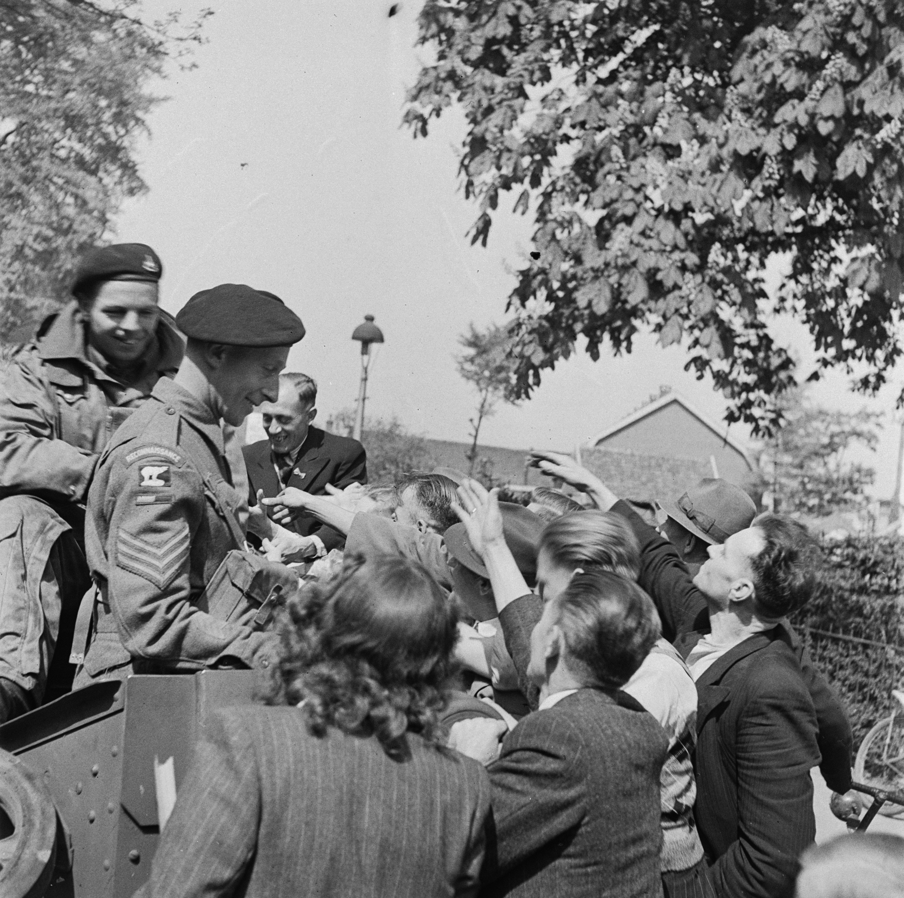 Collectie / Archief : Fotocollectie Anefo Reportage / Serie : Bevrijdingsvreugd: Amersfoort Beschrijving : Een Britse verkenningseenheid [49th West Riding Infantry Division, toegevoegd aan het Canadese 1e leger] wordt door burgers begroet. Datum : 7 mei 1945 Locatie : Amersfoort Trefwoorden : bevrijding, militairen, tweede wereldoorlog Fotograaf : Presser, Sem / Anefo, [onbekend] Auteursrechthebbende : Nationaal Archief Materiaalsoort : Negatief (zwart/wit) Nummer archiefinventaris : bekijk toegang 2.24.01.03 Bestanddeelnummer : 900-2835